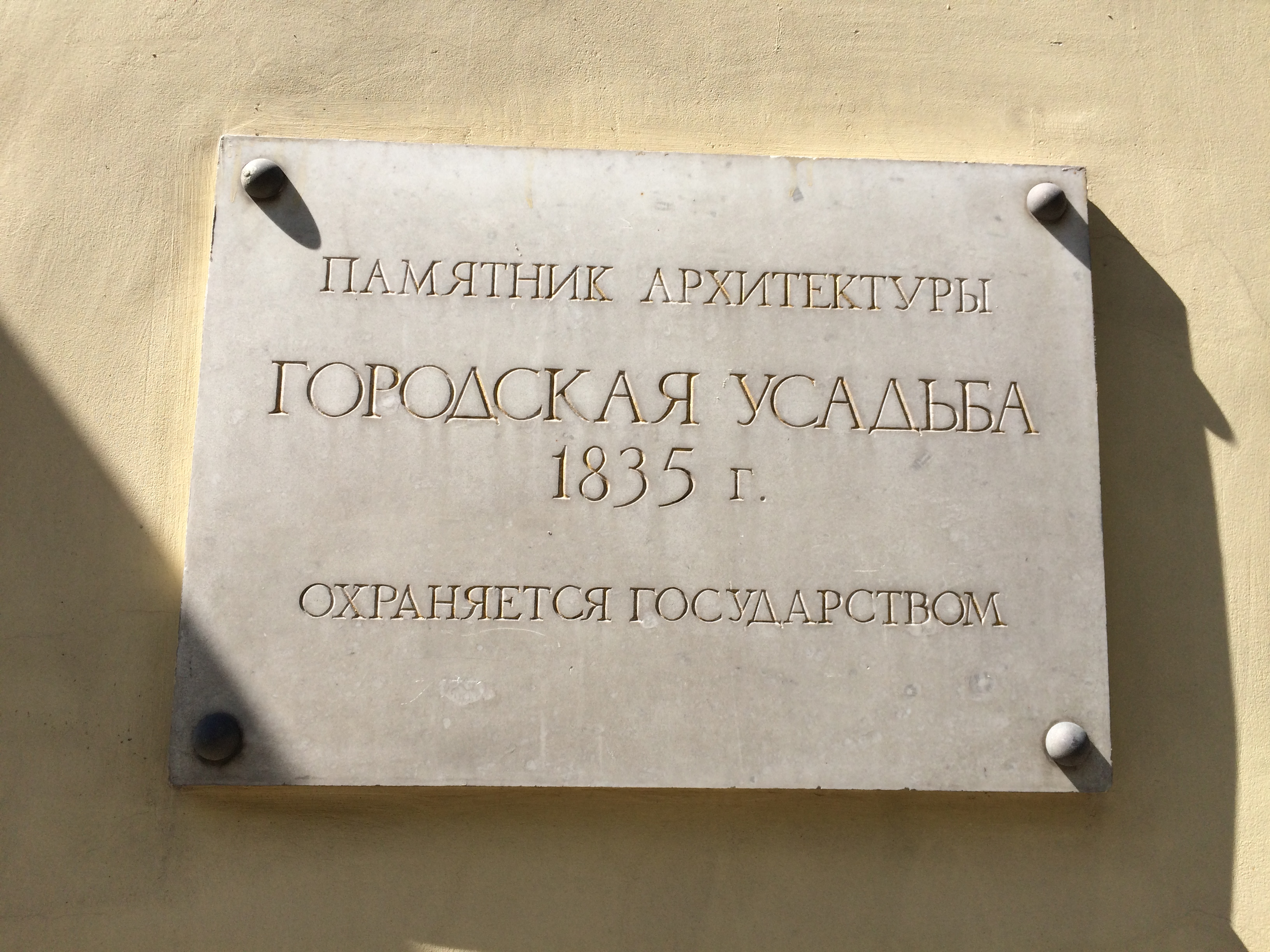 Starpmonetny lane